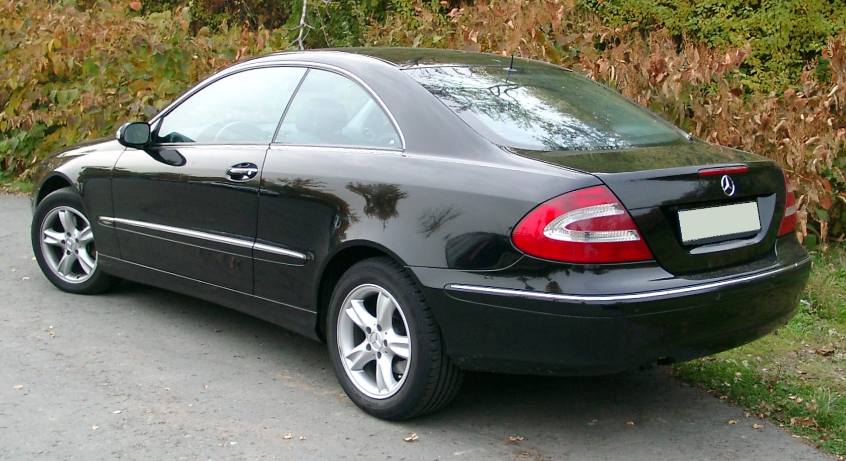 Mercedes-Benz W209